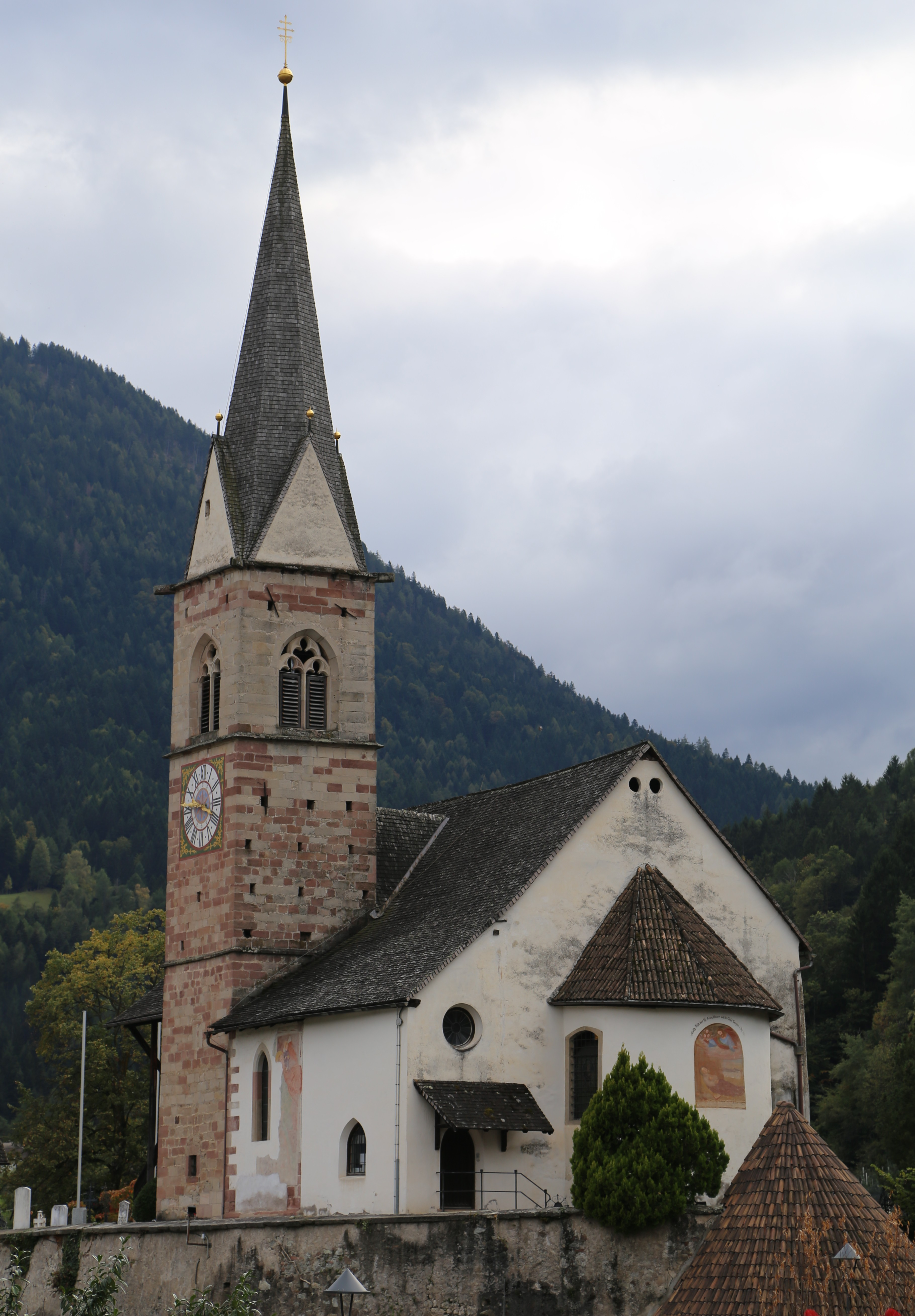 Pfarrkirche St. Severin in Völlan, Gemeinde Lana